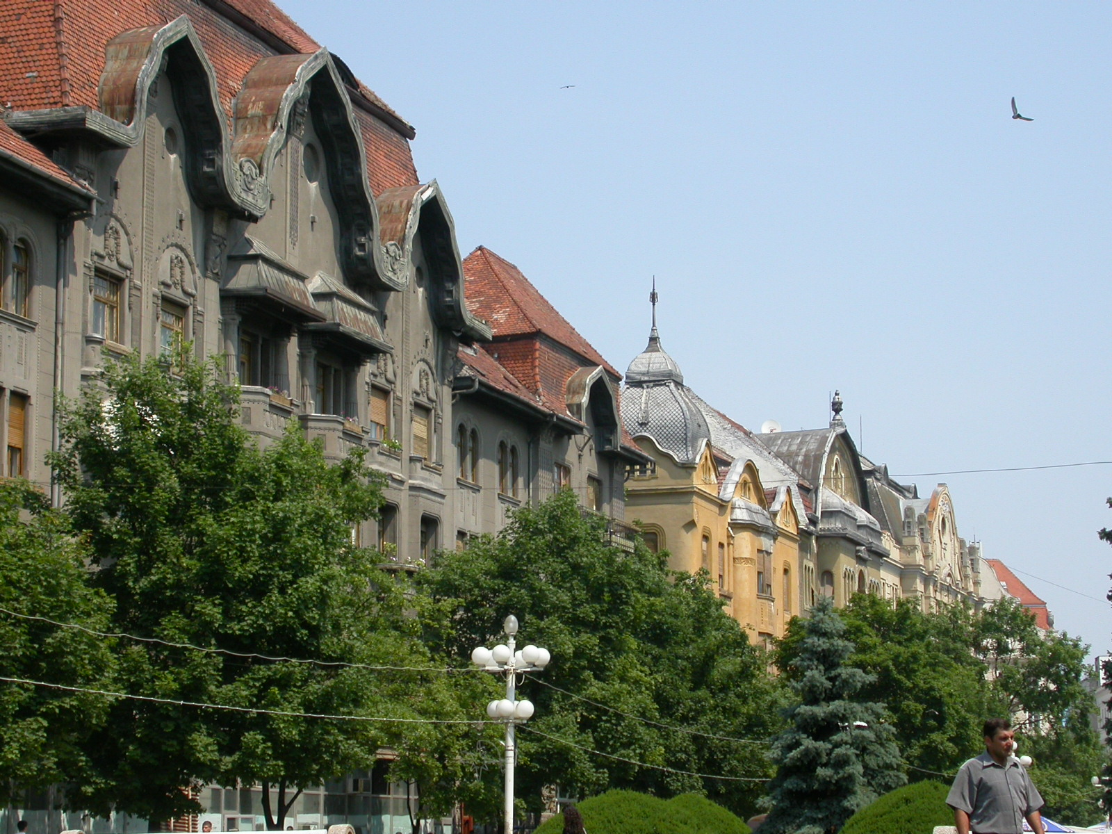 Ansamblul urban "Corso" sec. XX